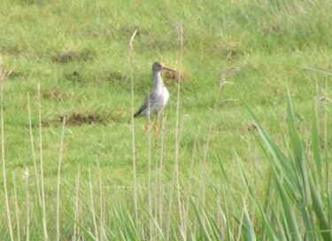 Tringa totanus guarding his nest